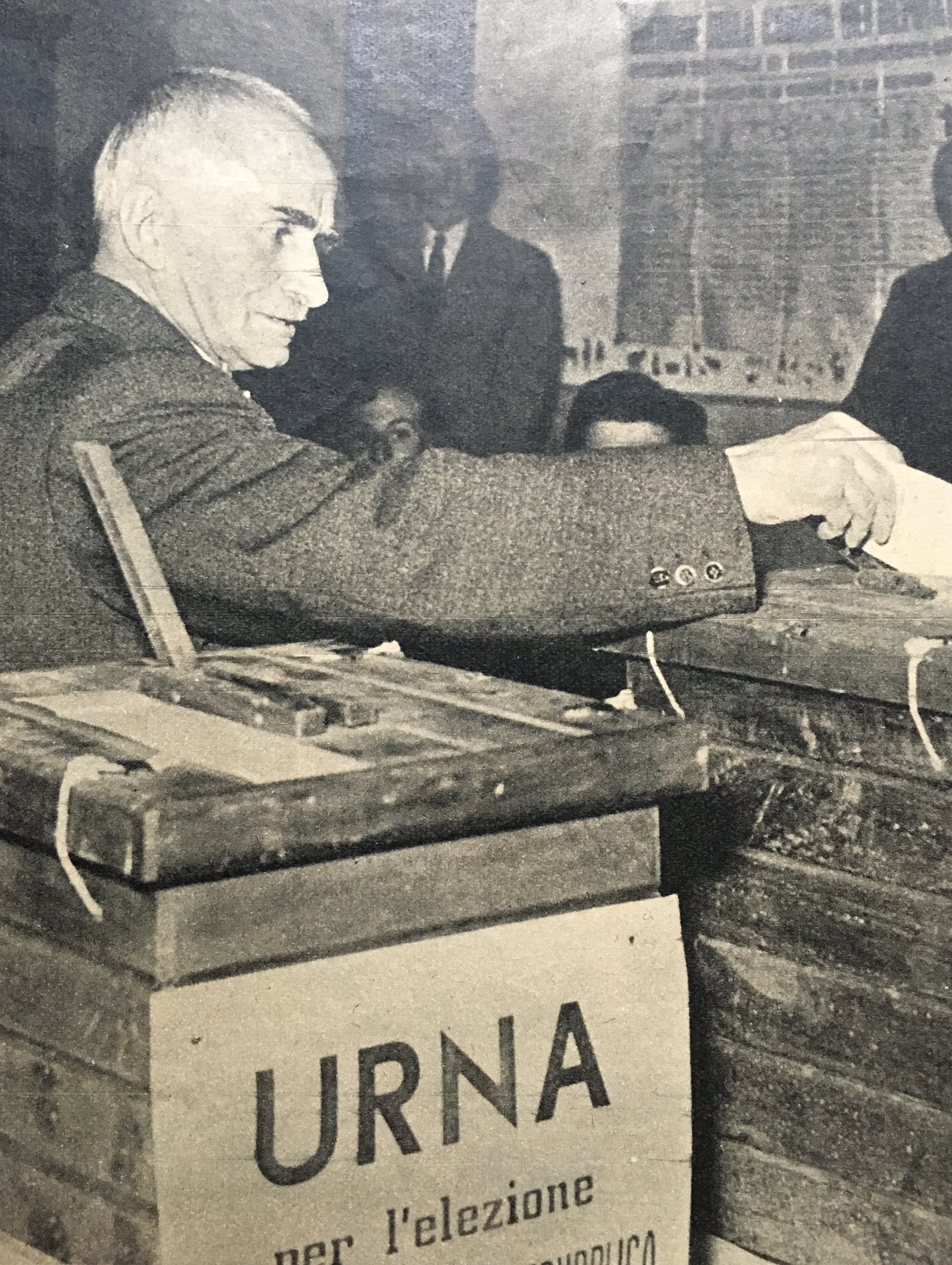 Luigi Einaudi a Dogliani nel giugno 1953